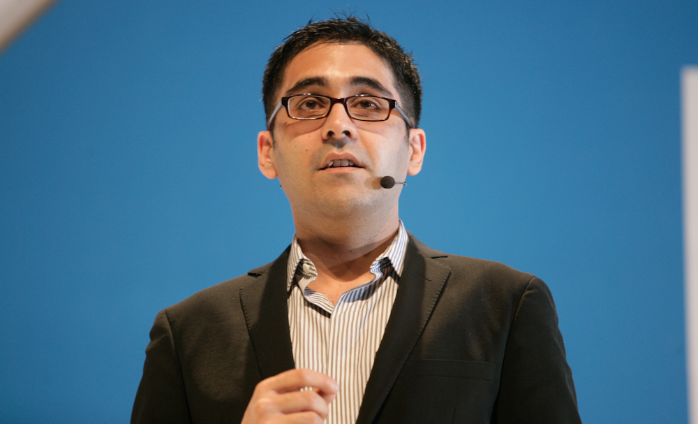 Umair Haque - next conference 09 - 05.05.2009